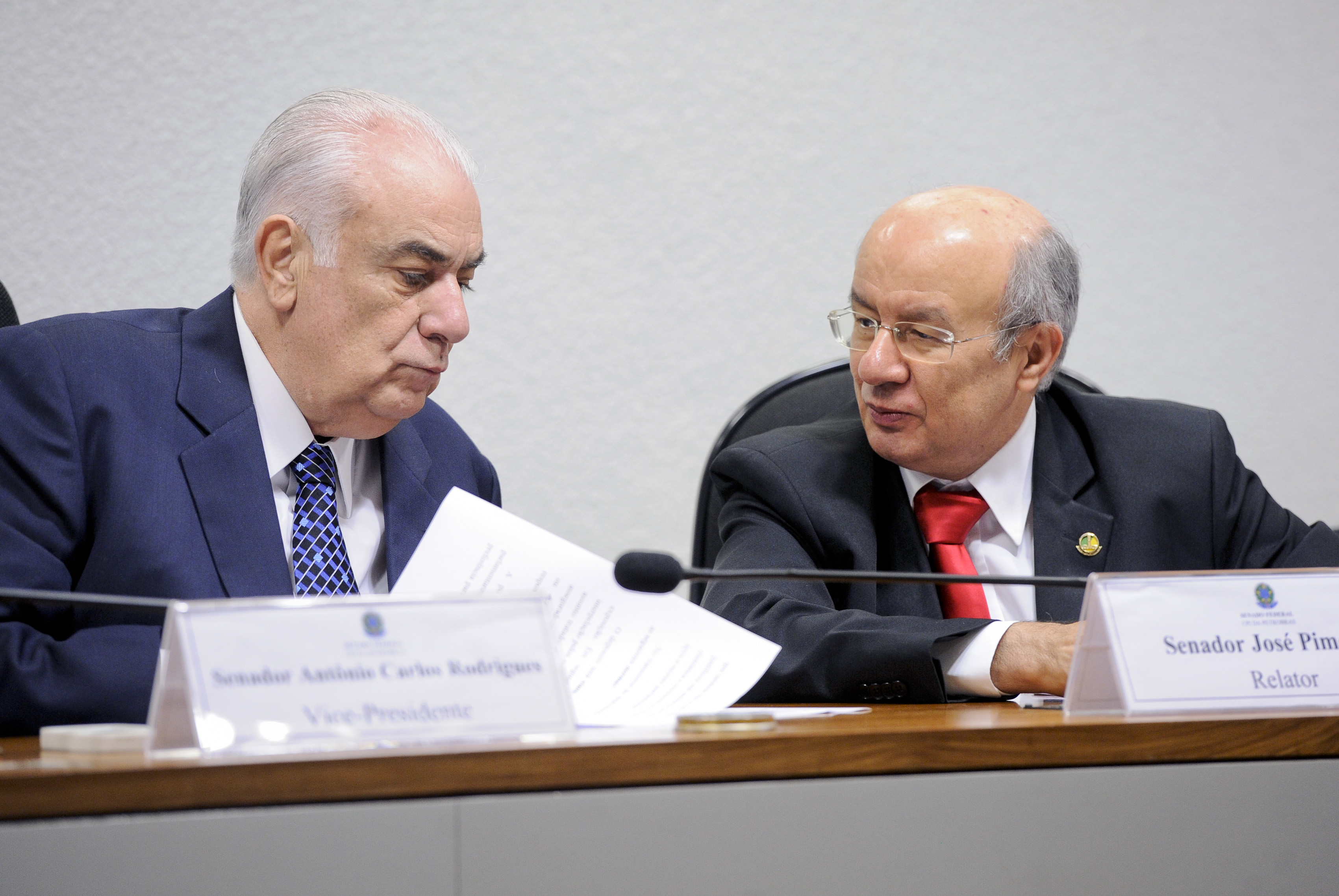 (E/D) Senadores Antonio Carlos Rodrigues (PR-SP), vice-presidente da CPI e José Pimentel (PT-CE), relator, durante reunião destinada a ouvir o gerente-geral de Implementação de Empreendimentos da Petrobras, Glauco Colepicolo Legatti Foto: Pedro França/Agência Senado